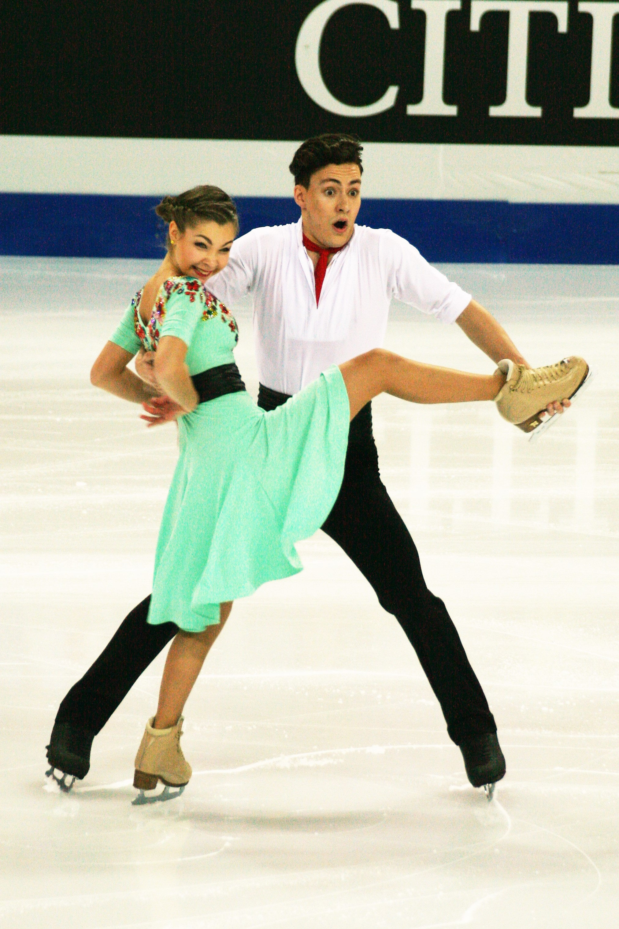 Анастасия Шпилевая / Григорий Смирнов (Россия) на финале Гран-при по фигурному катанию среди юниоров 2016-2017